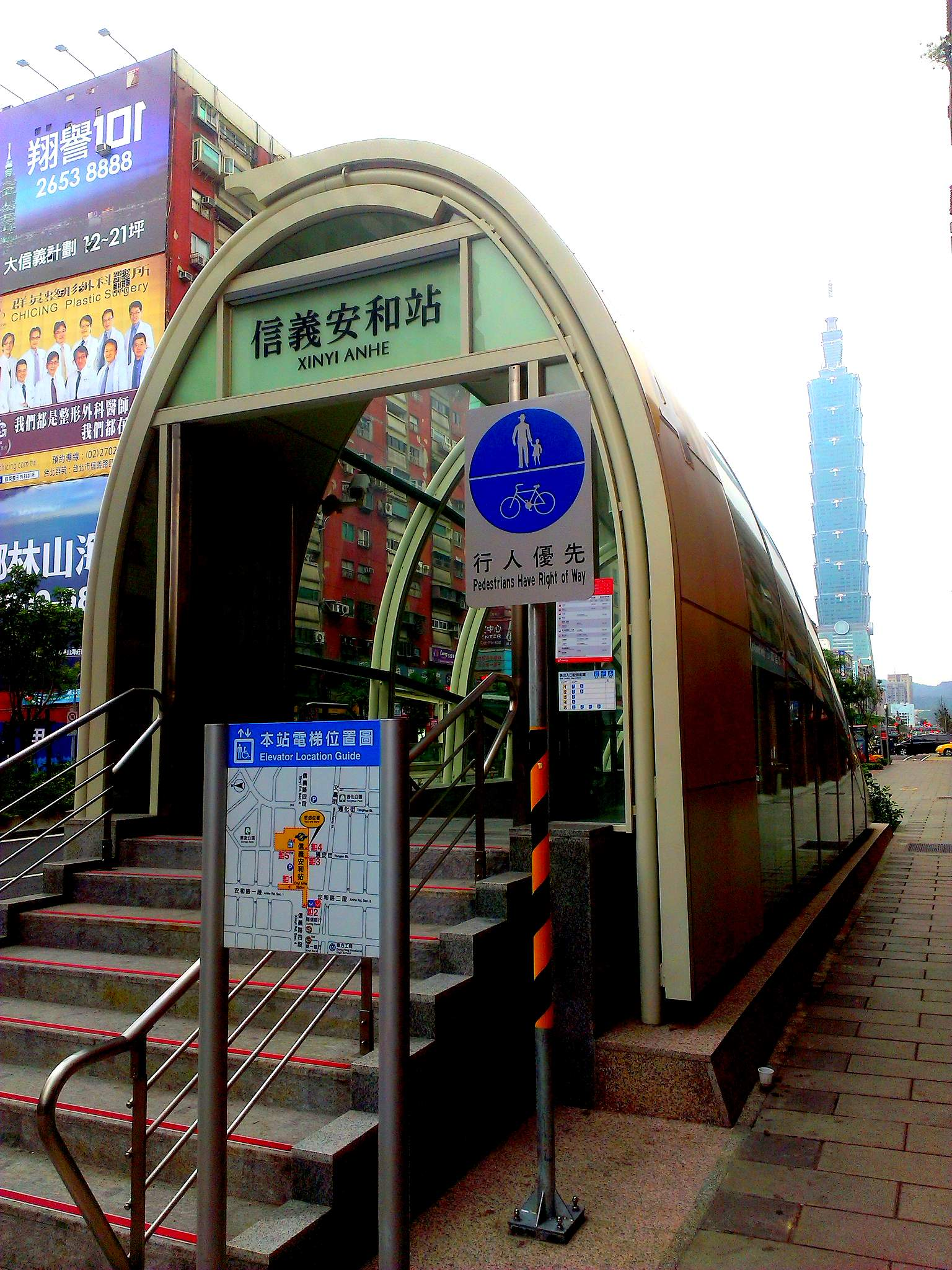 台北捷運信義安和站四號出口（信義路上）。